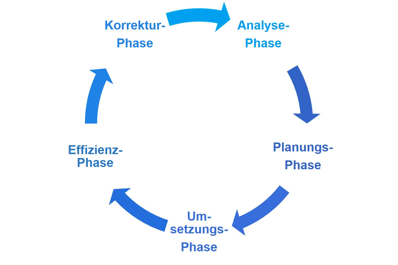 CoC Lifecycle — process diagramm